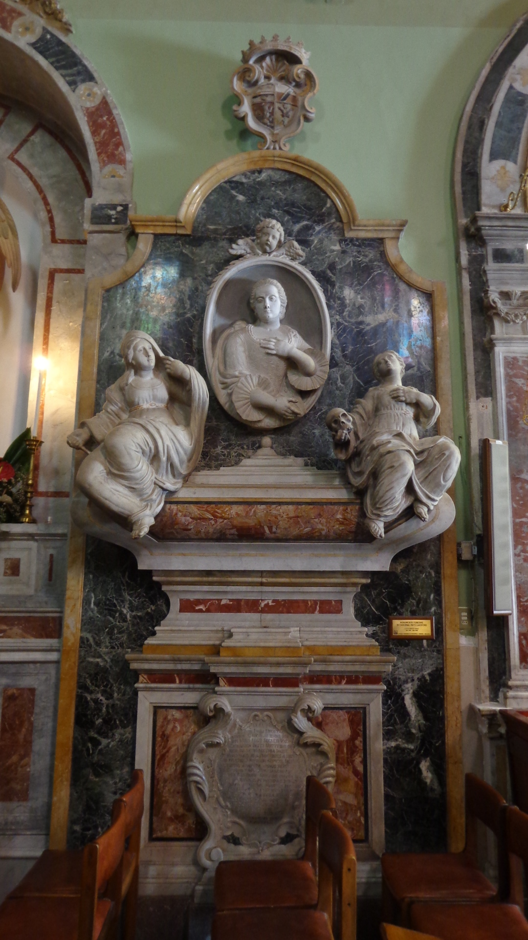 Sepolcro tre